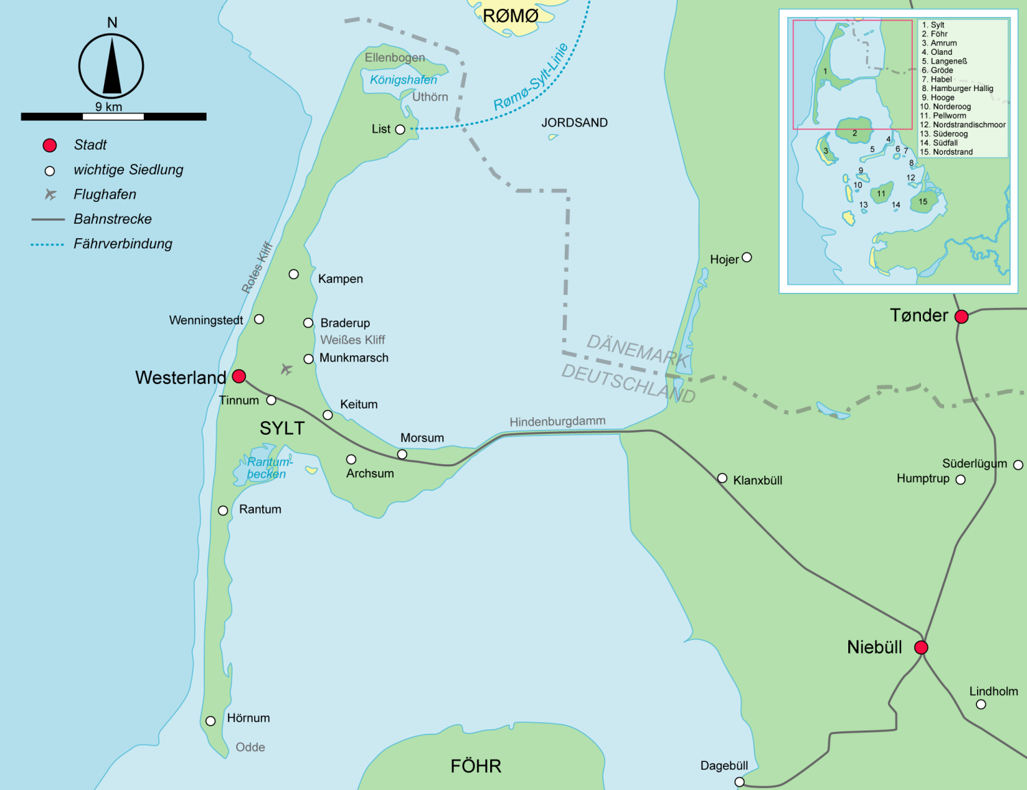 Sylt